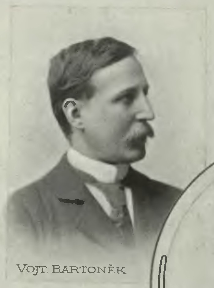 Vojtěch Bartoněk (1859 - 1908), Český malíř.